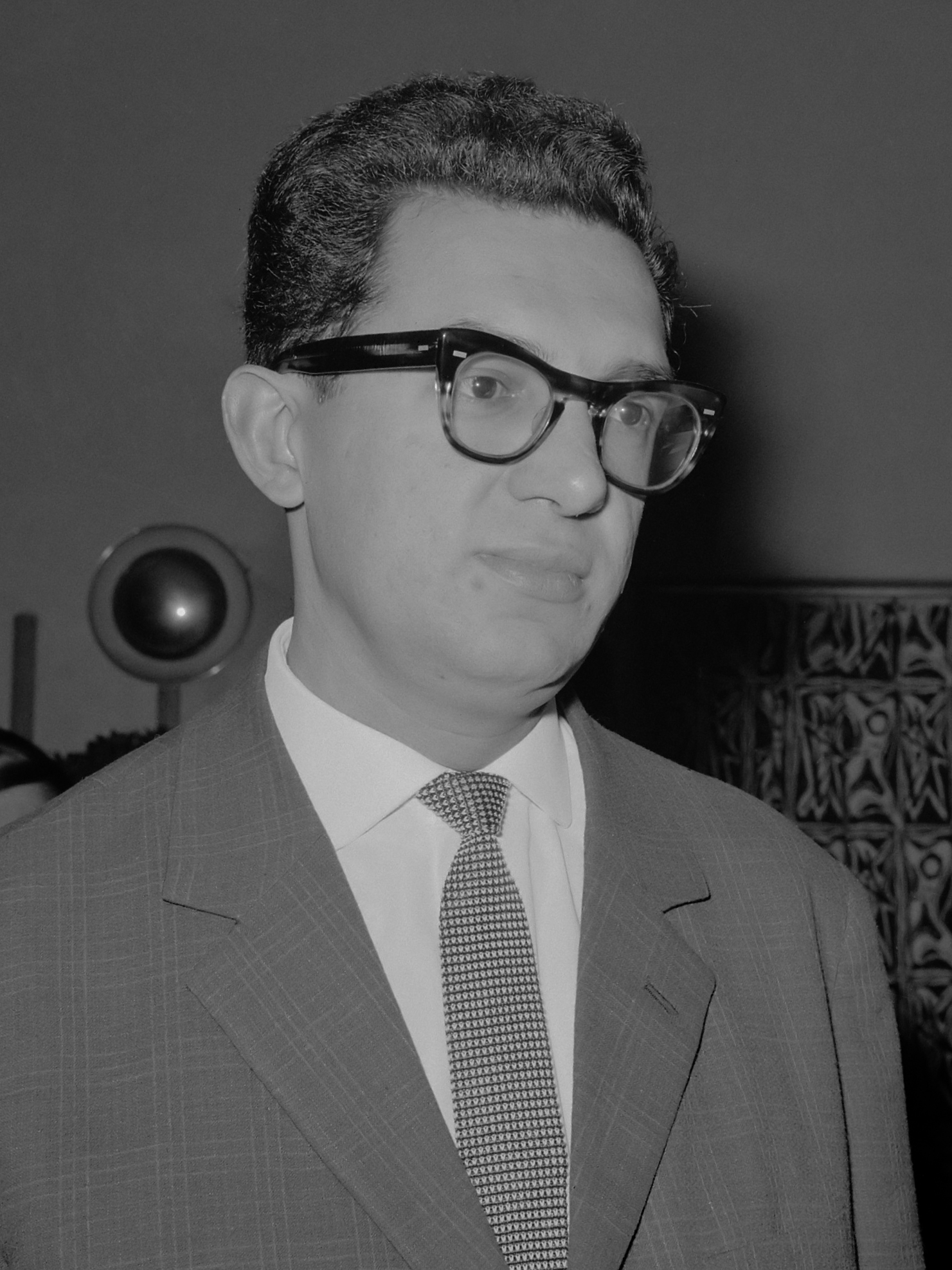 27e Hoogovenschaaktoernooi te Beverwijk, W. K. Bagirov (kop) USSR 5 januari 1965